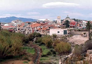 Vista panorámica de Alguazas, en Murcia (España), desde el río Mula, con la Iglesia de San Onofre y al fondo Sierra de Ricote.